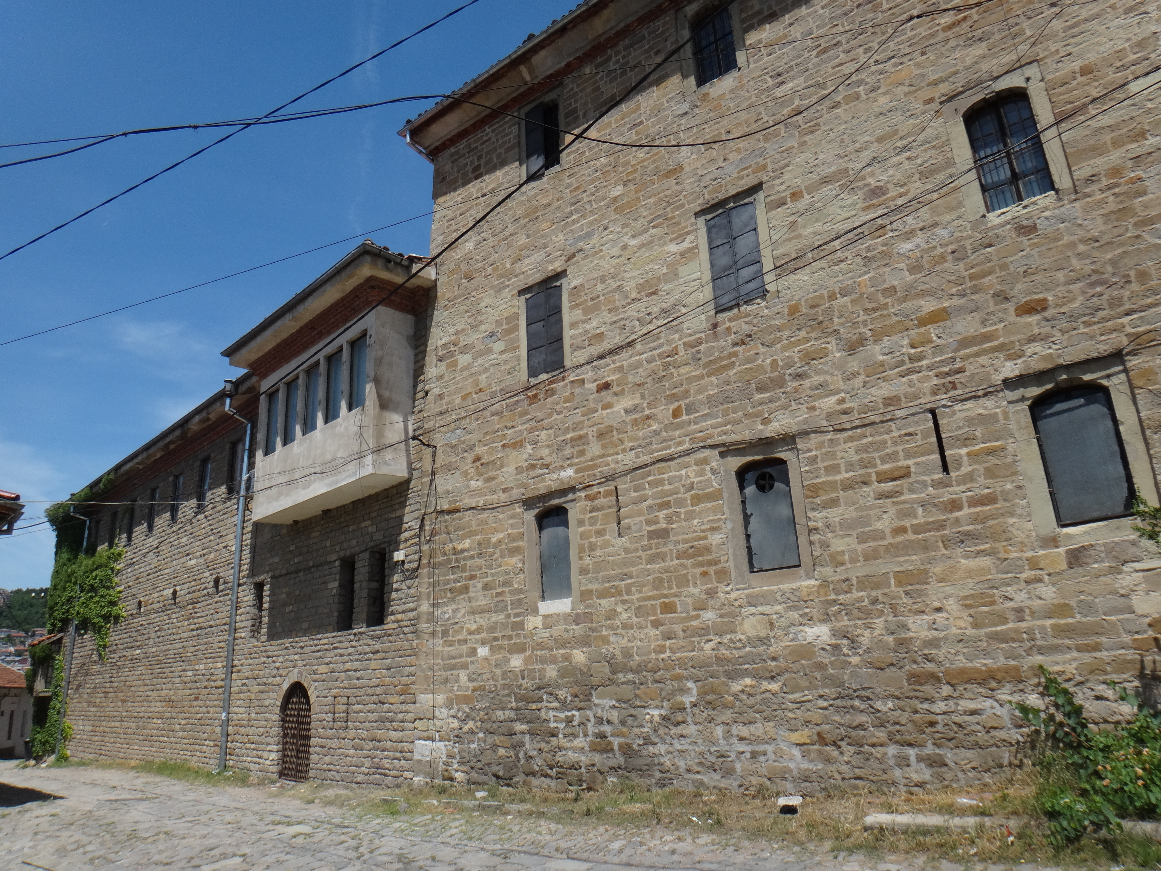 g.k. Varusha - south, 5000 Veliko Tarnovo, Bulgaria